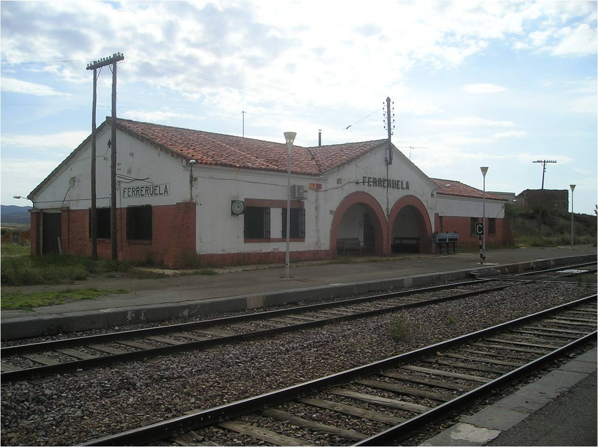 Estación de viajeros de Ferreruela de Huerva (Teruel).